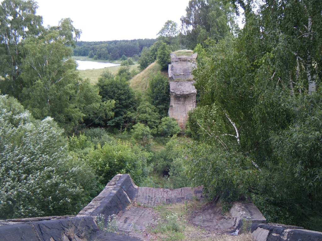 Ruiny mostu w Kruklankach.